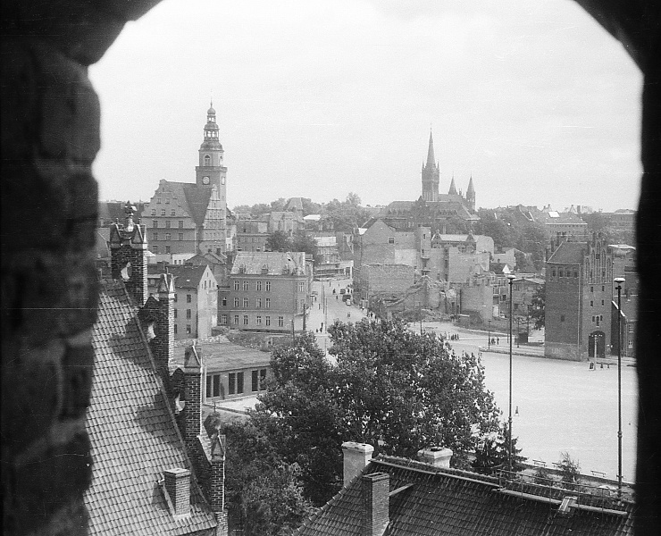 Olsztyn